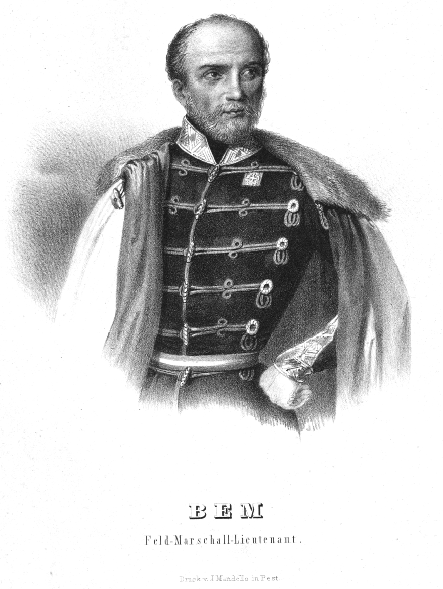 Józef Zachariasz Bem (magyarosan Bem József), a székelyek Bem apója (Tarnów, 1794. március 14. – Aleppó, 1850. december 10.) lengyel és magyar honvéd altábornagy.